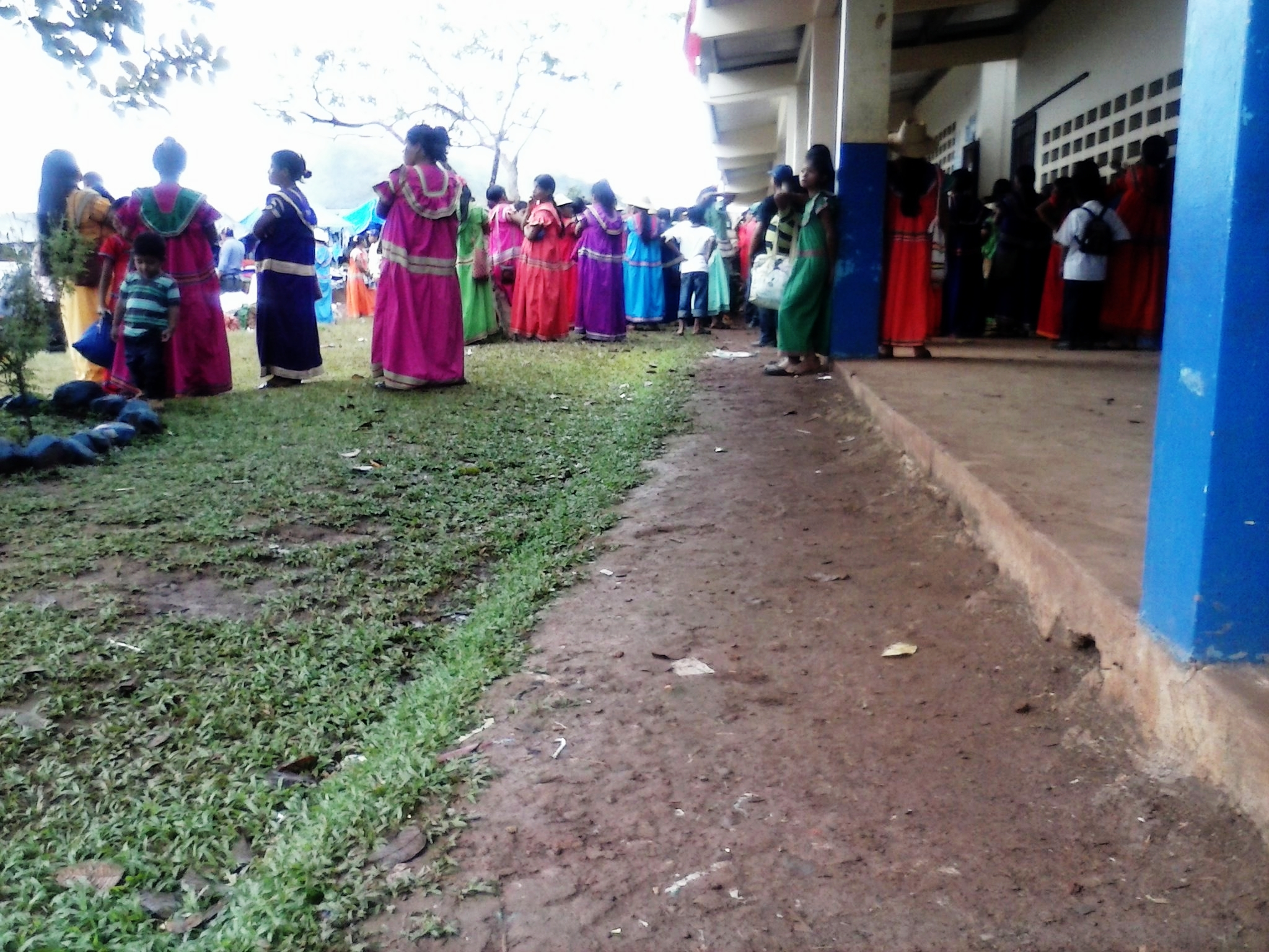 Foto tomada en la Comunidad de Cerro Vaca